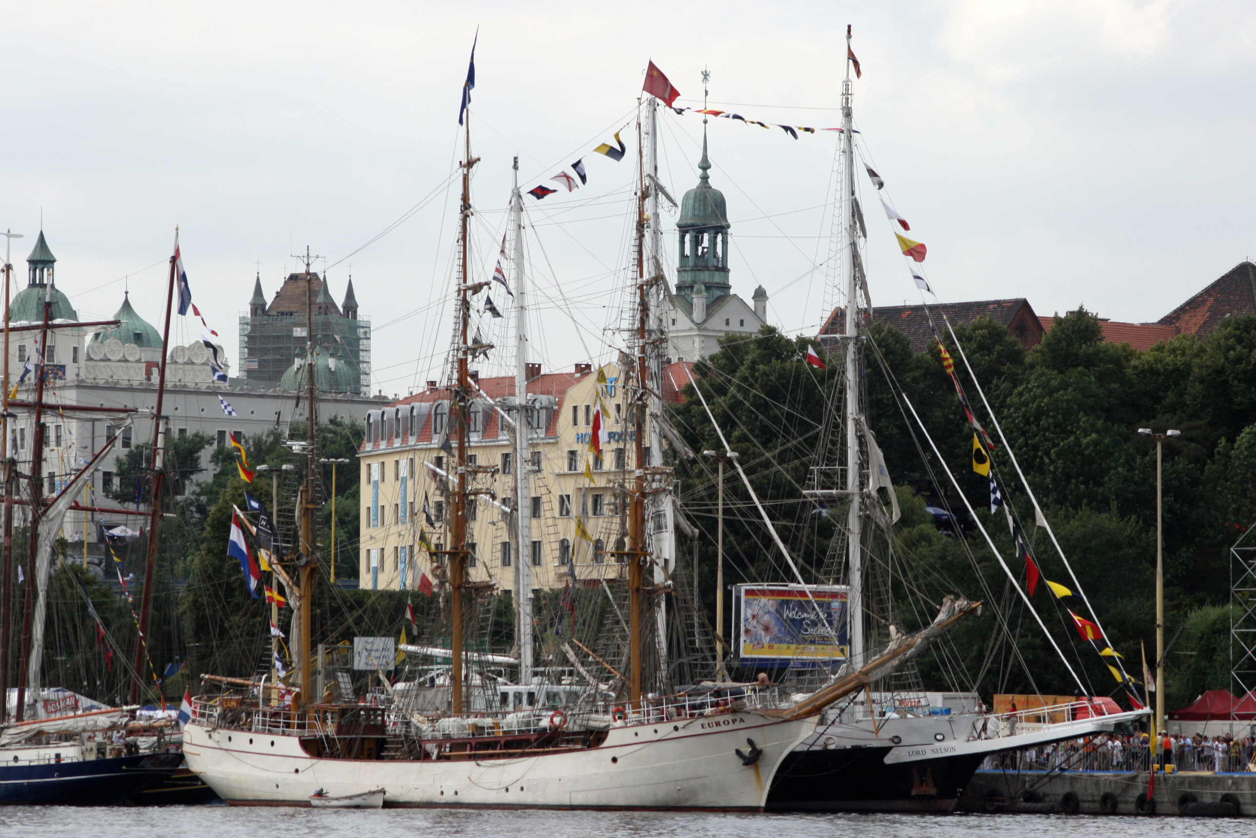 Europa (z przodu) & Lord Nelson (z tyłu), The Tall Ships' Races, Szczecin 2007